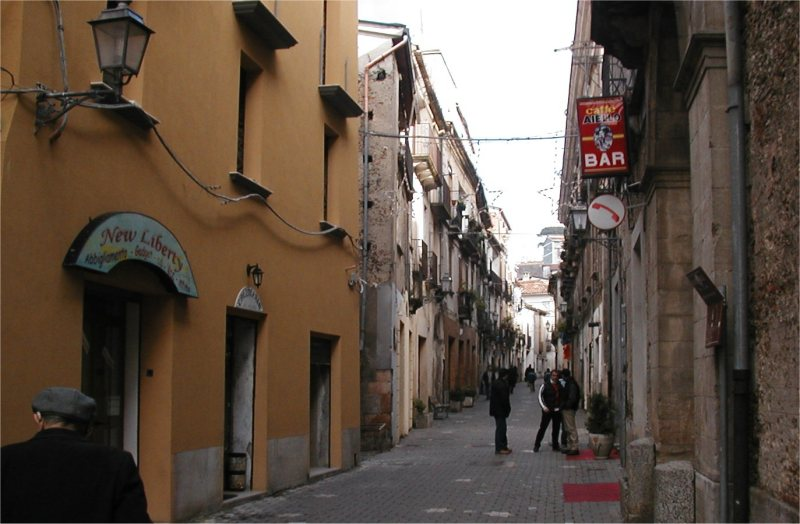 Rogliano, Corso Umberto (Foto di Luigino C.)